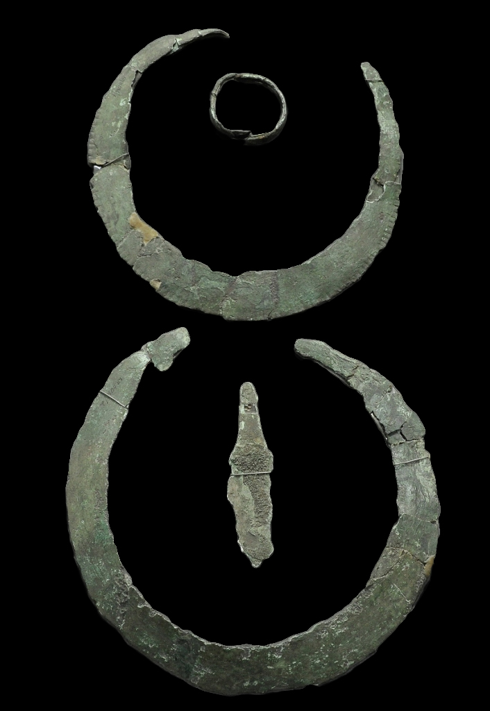 Дыядэма. Бронзавы век. Бронза. Могільнік Страліца. Веткаўскага раёна Гомельскай вобласці. Раскопкі І.І. Арцёменкі.